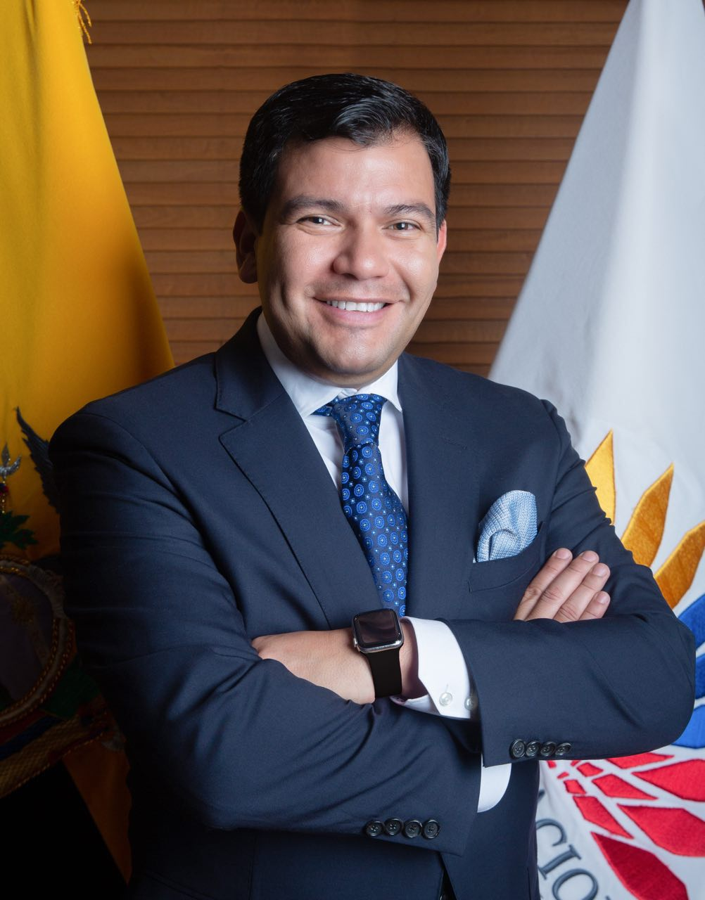 Presidente de la Asamblea Nacional del Ecuador 2019 - 2021